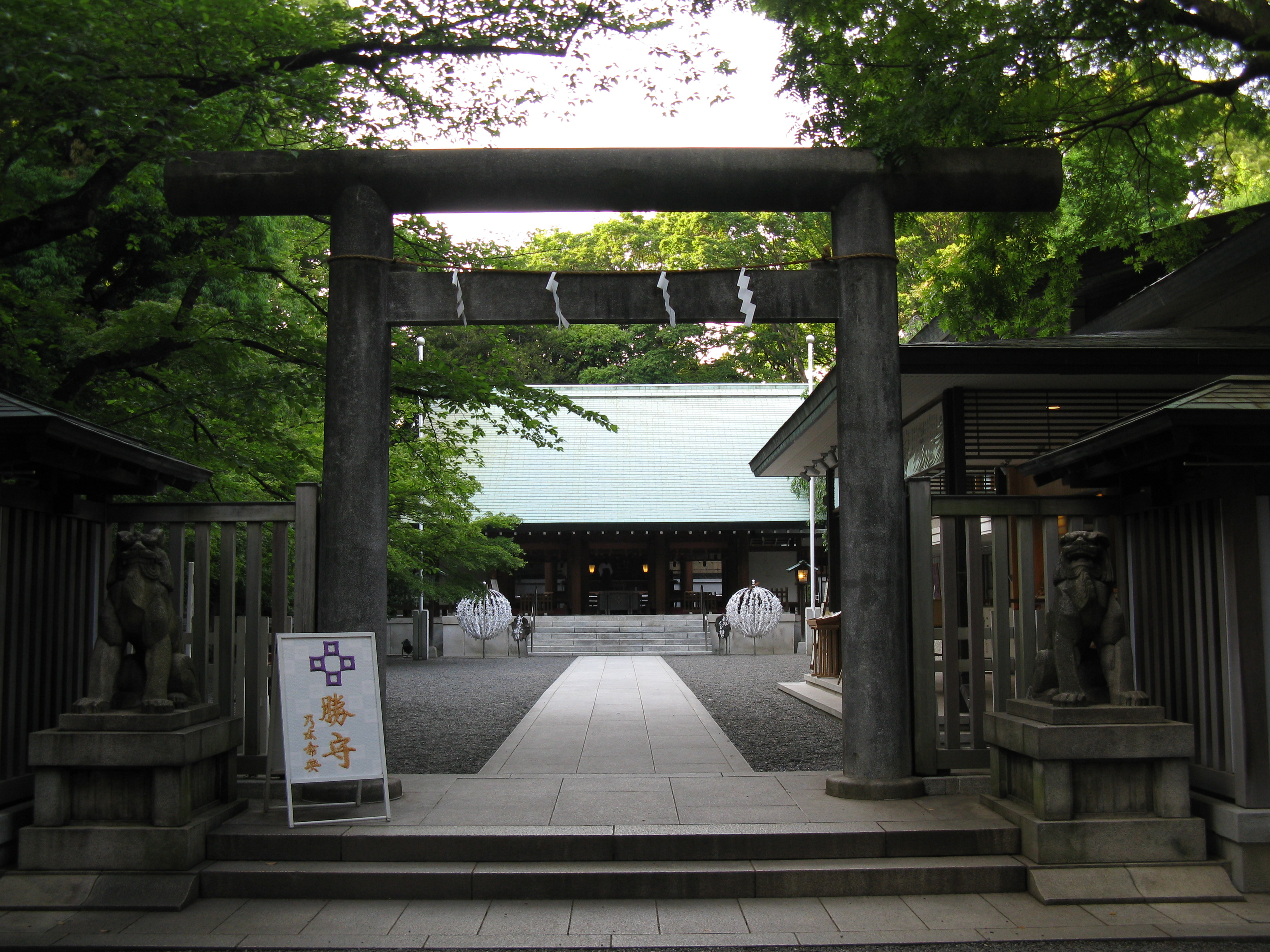 乃木神社